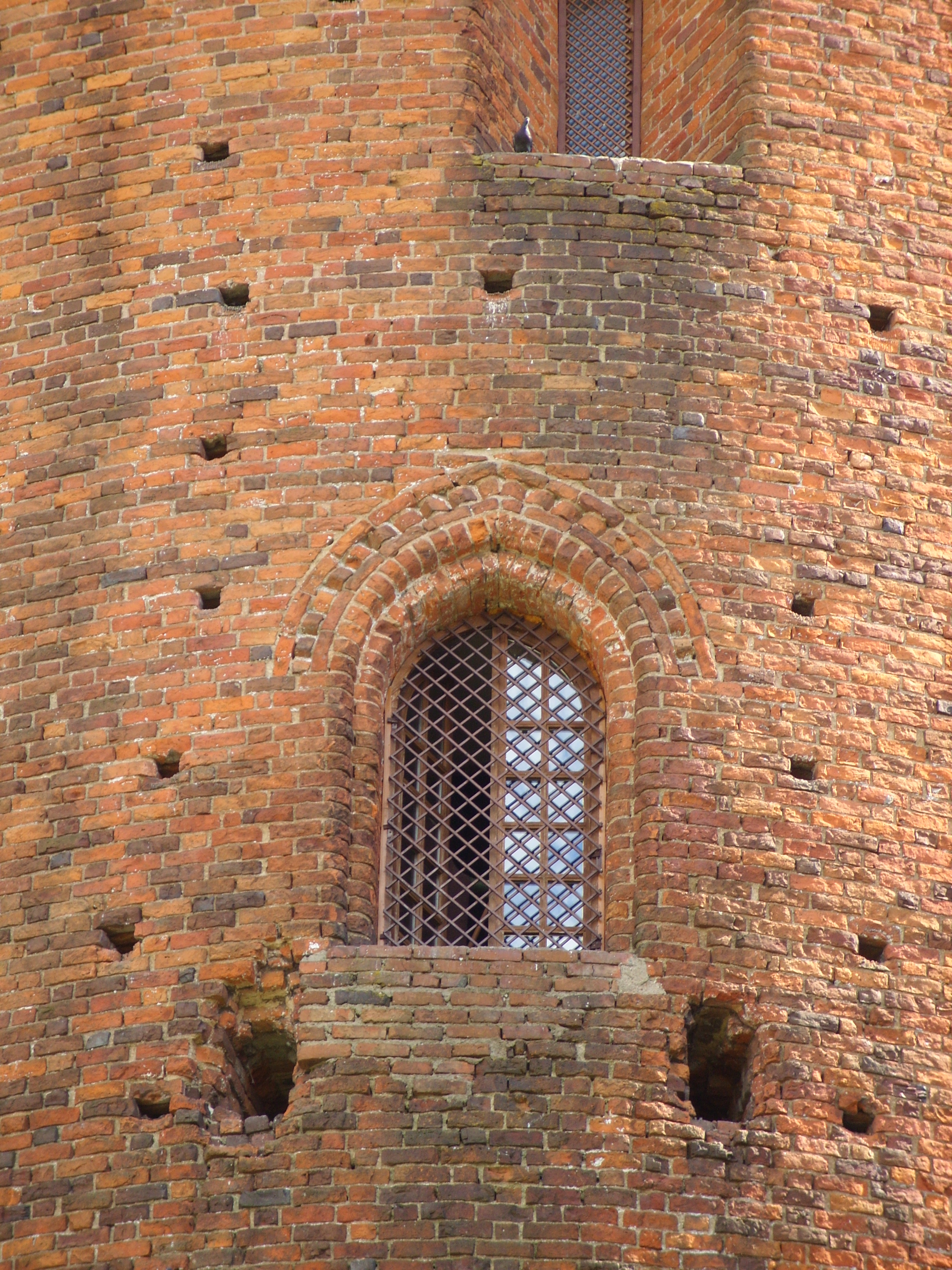 Былы ўваход у вежу